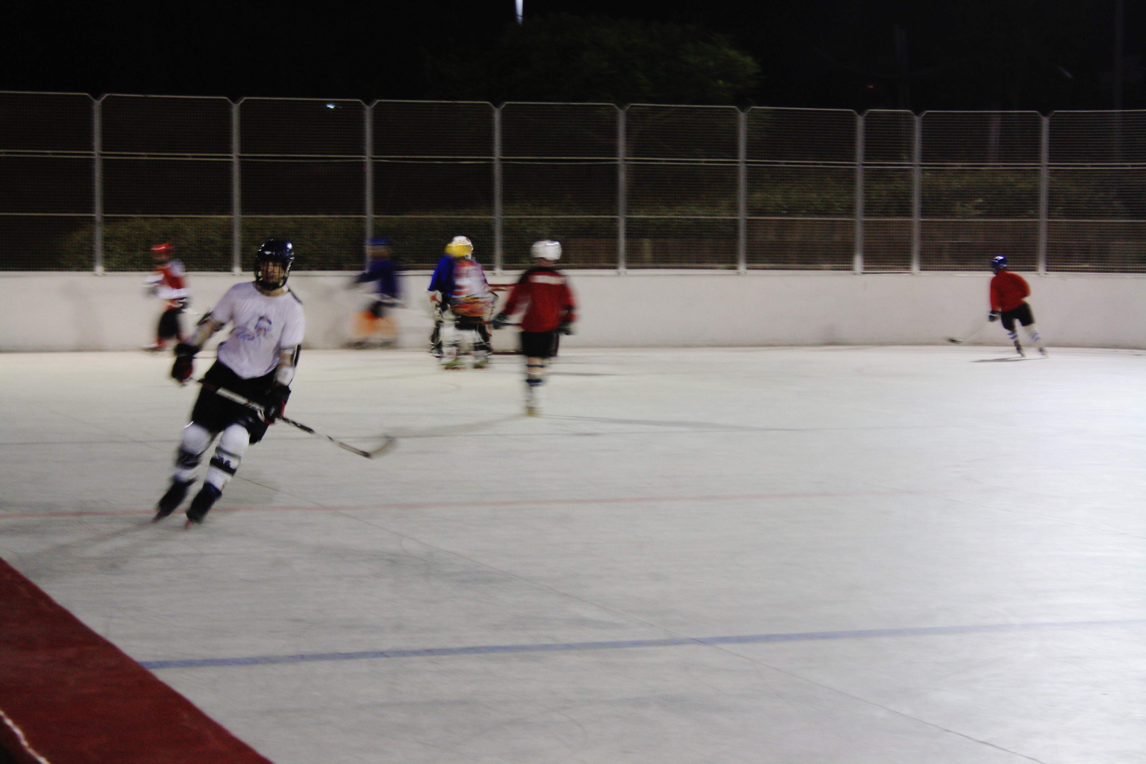 שחקני הוקי רולר במגרש ההוקי רולר של ראשון לציון.